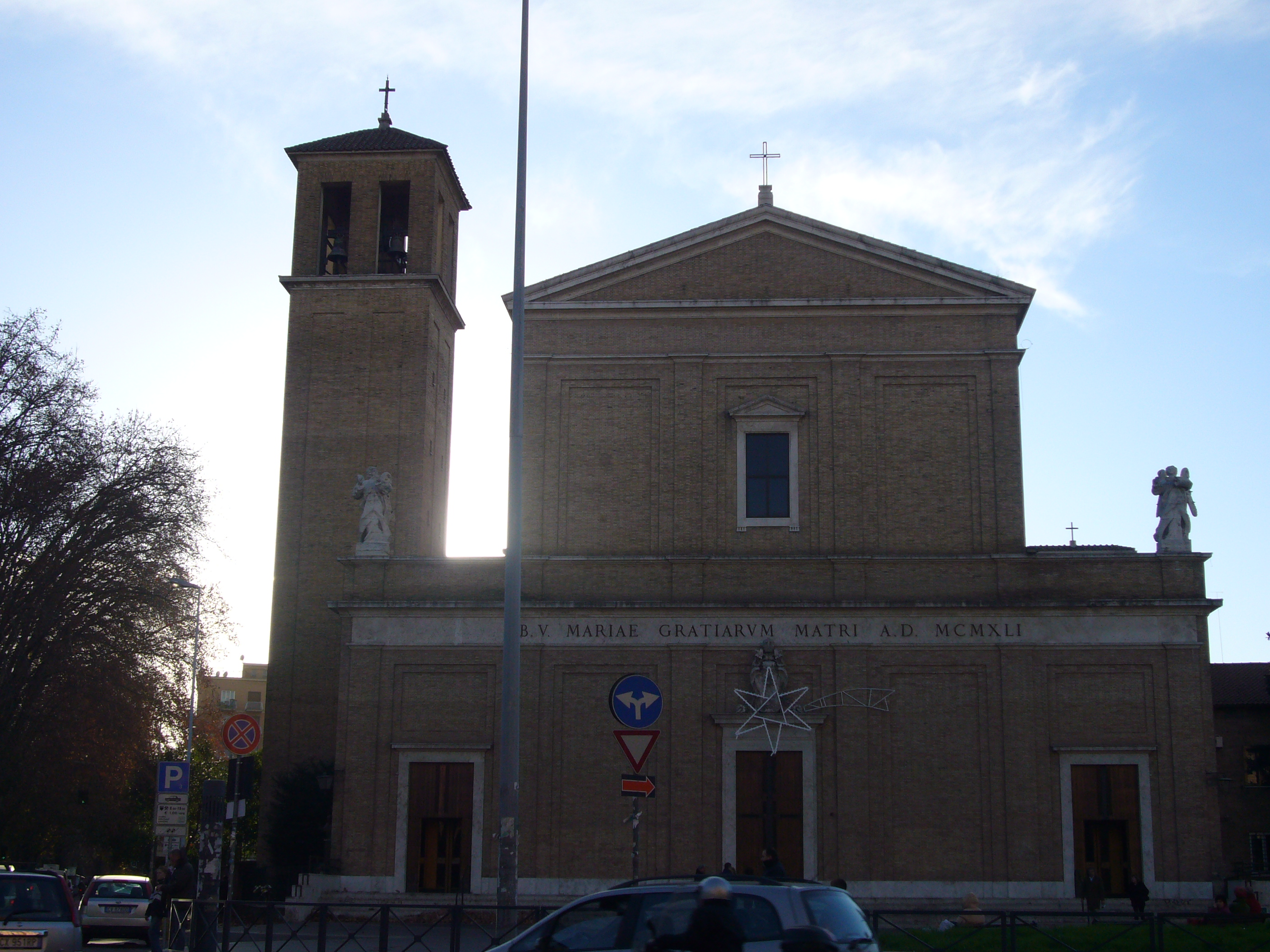 Roma, Santa Maria delle Grazie al Trionfale